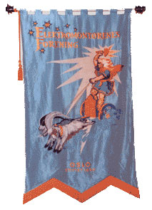 Fane for Elektromontørenes forening Oslo og Akershus